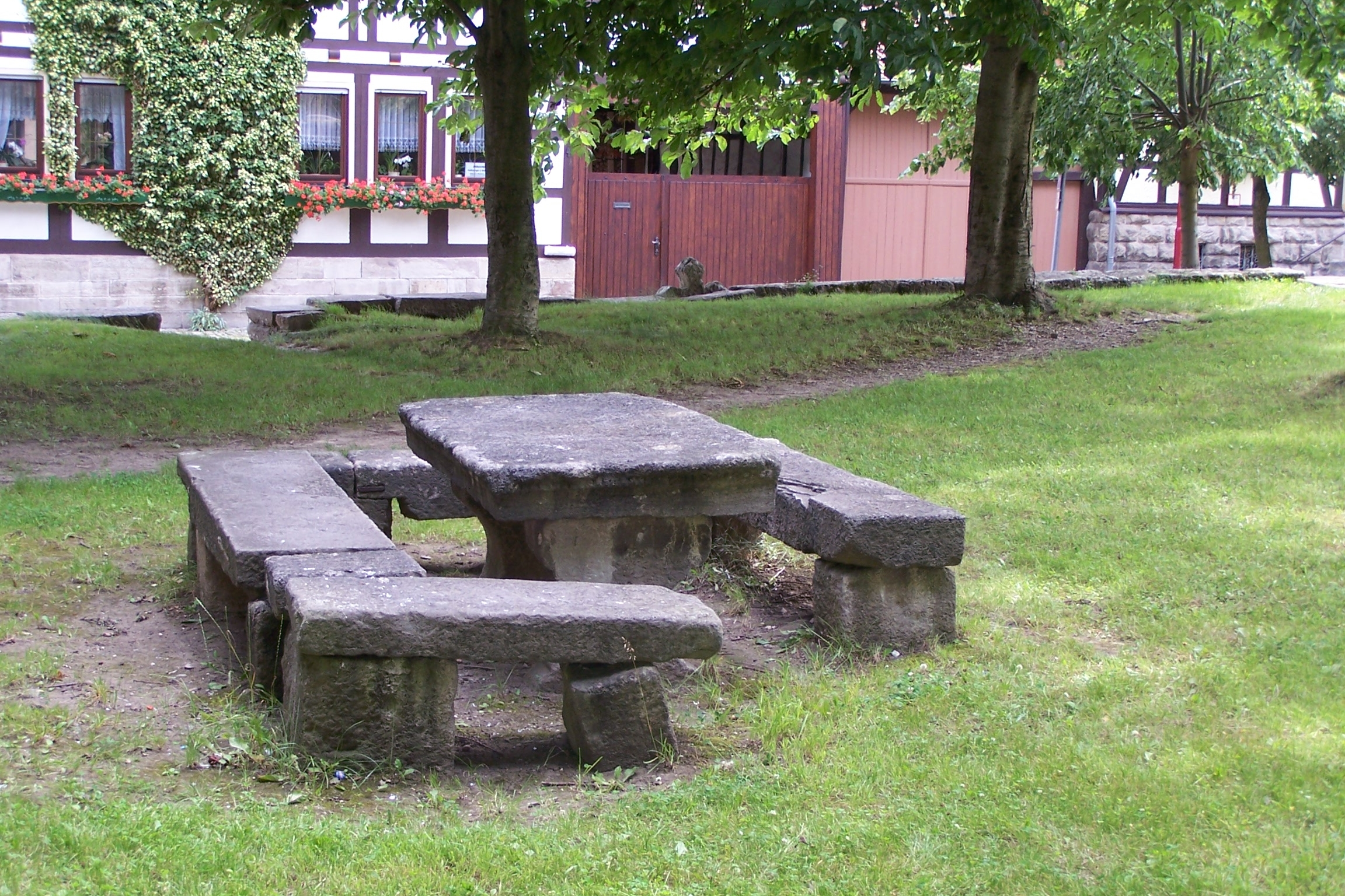 Auf dem von einer Mauer eingefriedeten Dorfplatz an der Kirche befindet sich der Gerichtstisch und in der Mauer ein Steinkreuz als Zeichen der Gerichtsbarkeit.